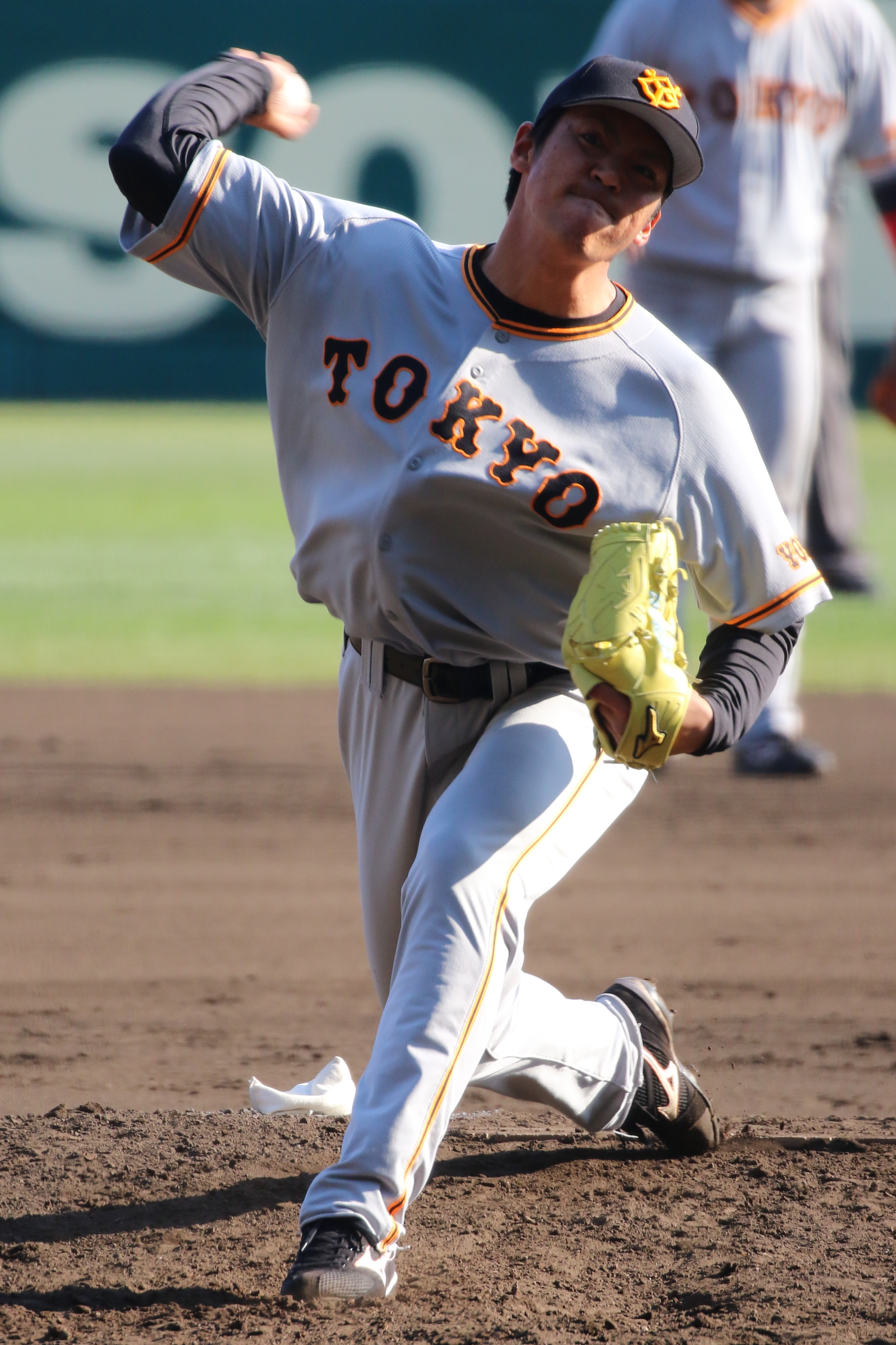 ジャイアンツ篠原選手